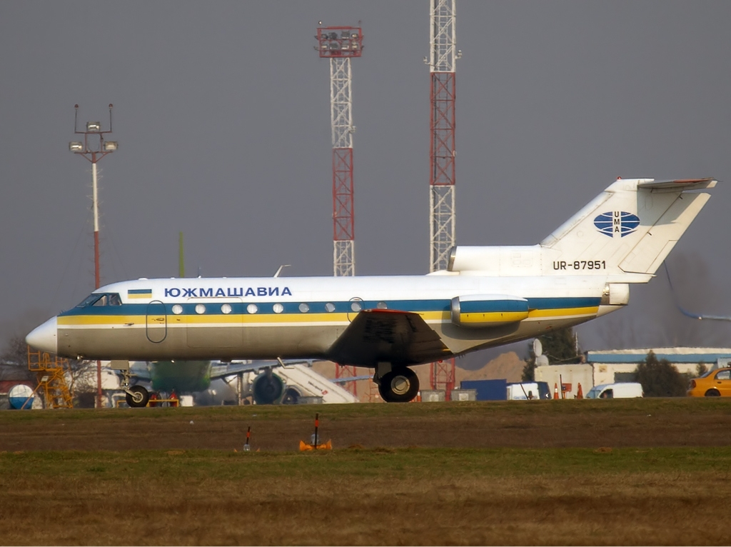 Yuzhmashavia Yakovlev Yak-40K